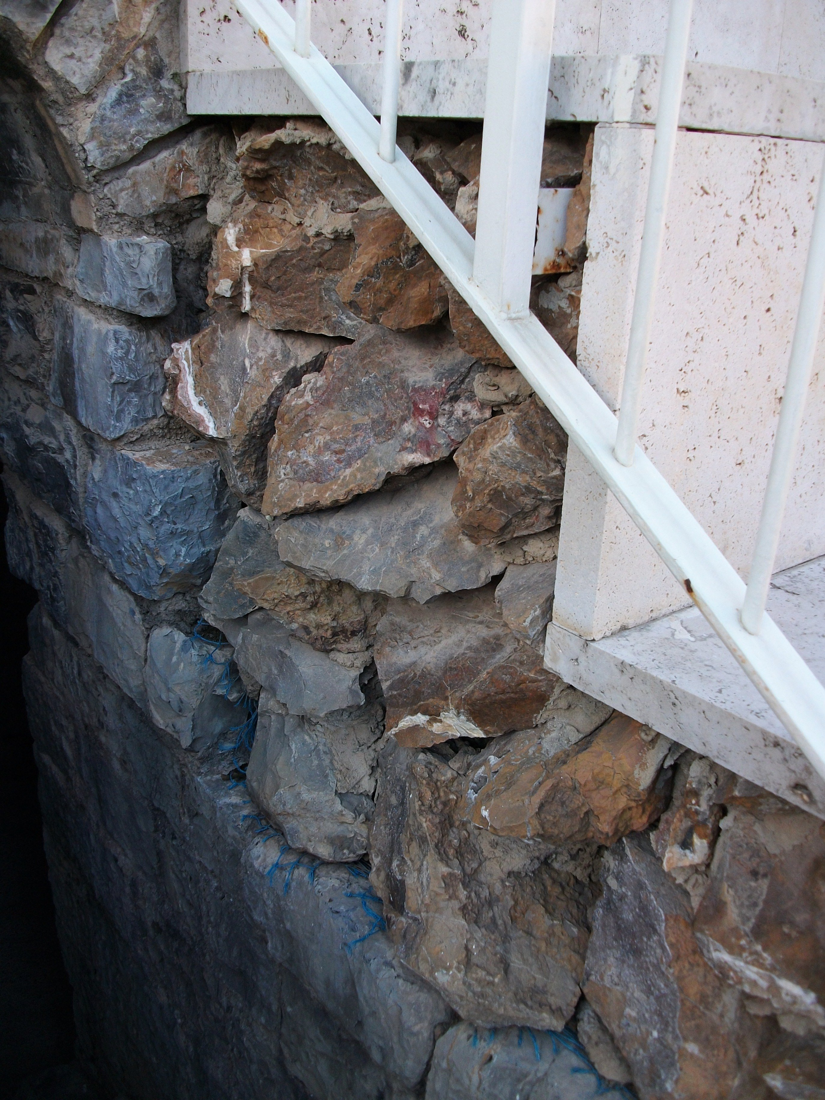 Teatre romà de Sagunt, detall dels materials.